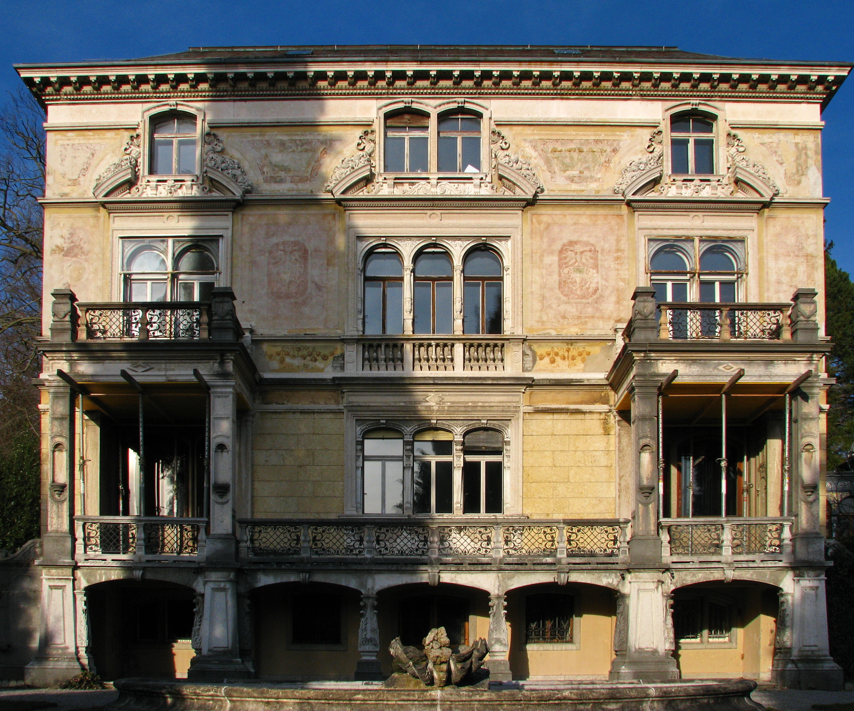 Villa Patumbah in Zürich-Mühlebach (Switzerland)